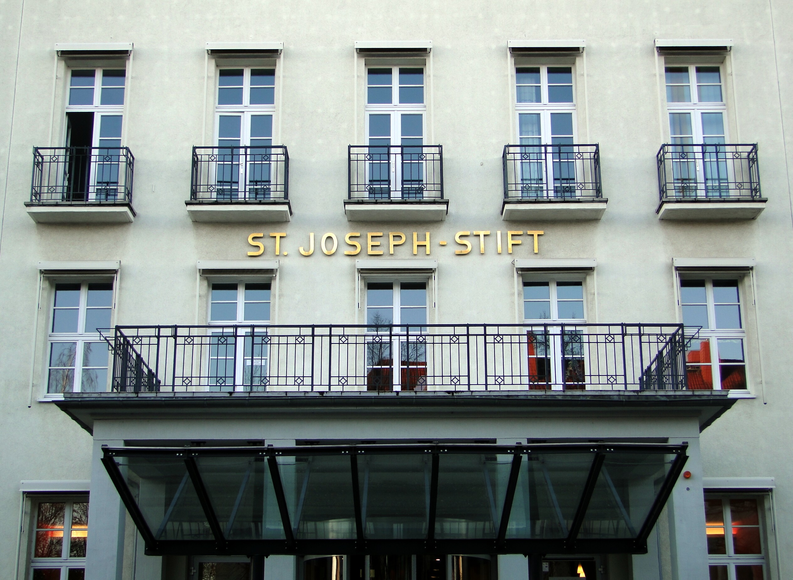 Eingang des St.-Joseph-Stift in Dresden